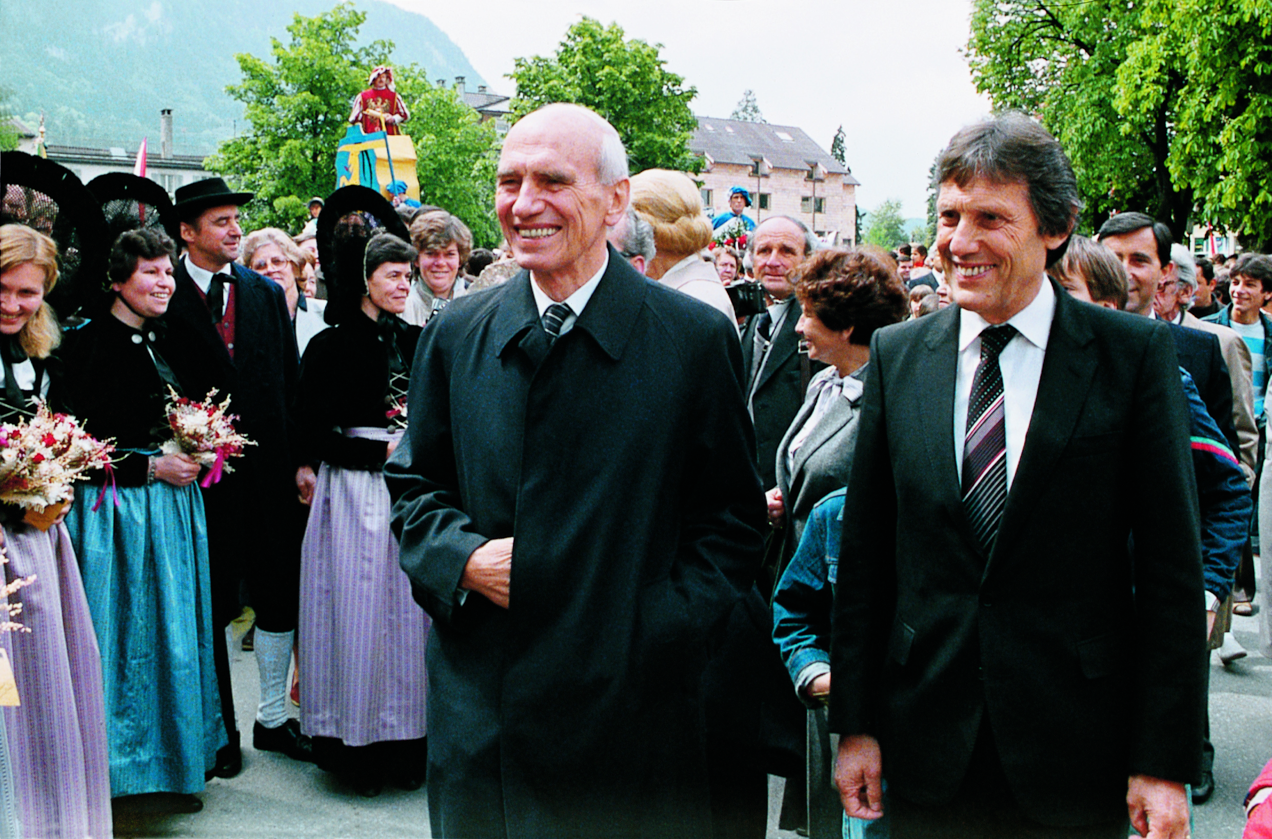 Otto Amann und Rudolf Kirchschläger bei der Stadterhebungsfeier von Hohenems